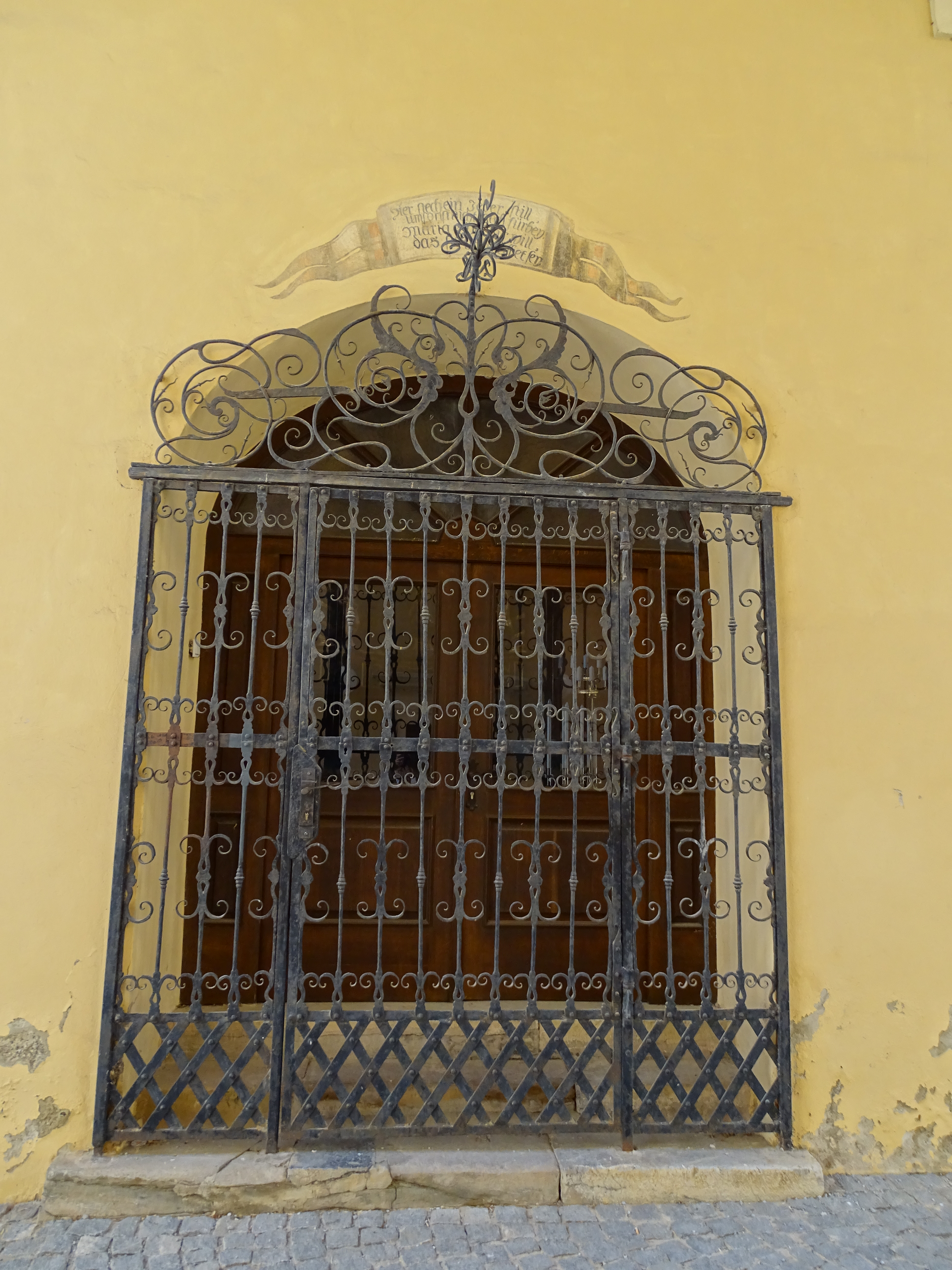 Das Portal zur Pestkapelle im Stift Rein